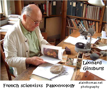 Léonard Ginsburg (1927-2009), professeur de paléontologie au Muséum national d'histoire naturelle, ici photographié le 16 juin 2001 dans son bureau de l'institut de Paléontologie dans la galerie de Paléontologie et d'Anatomie comparée au Jardin des plantes, à Paris.